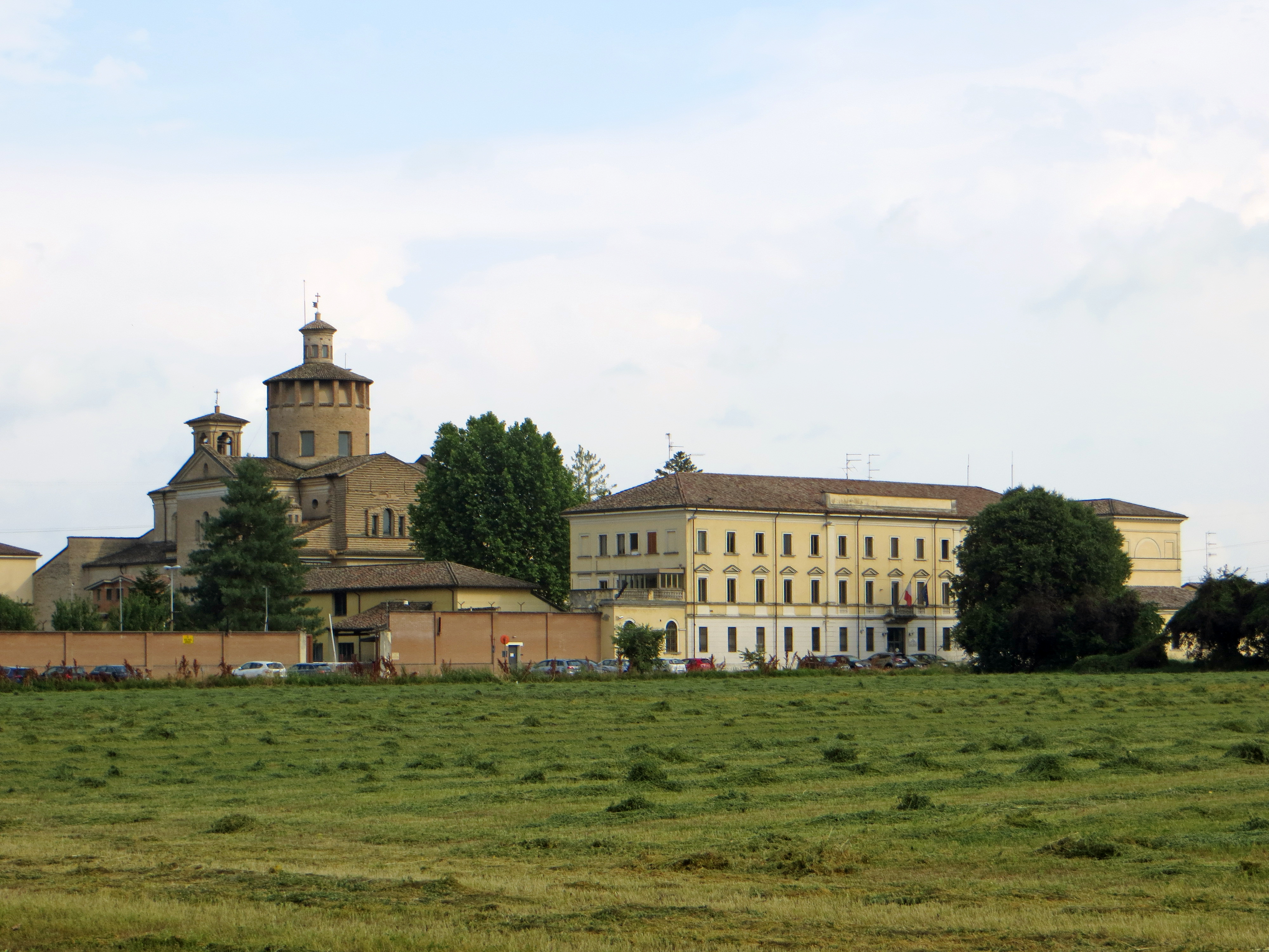 Certosa di San Girolamo (Parma) - vista da nord-ovest del complesso